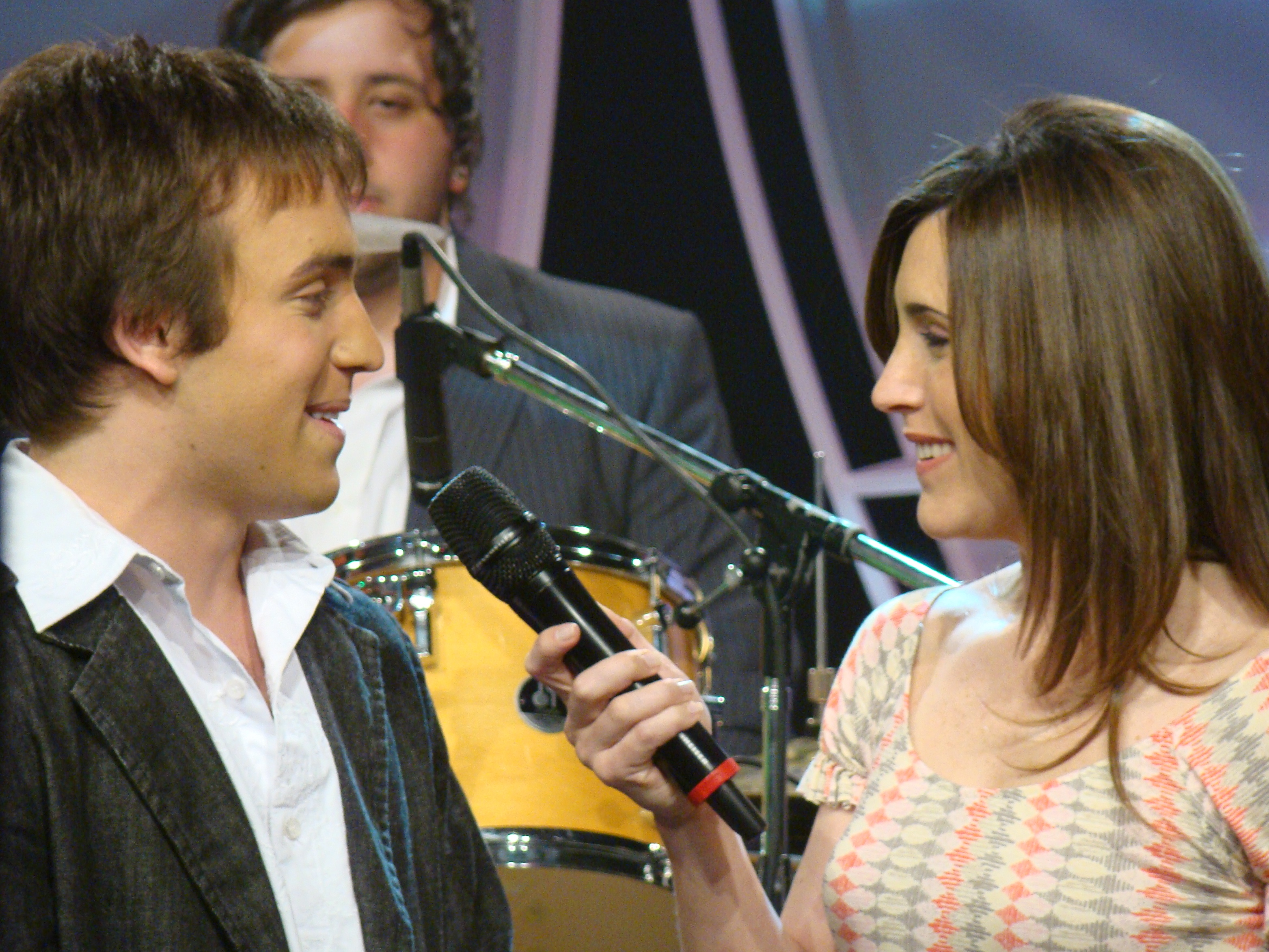 Conducido por Soledad Pastorutti y Marcelo Iribarne. Año 2010.